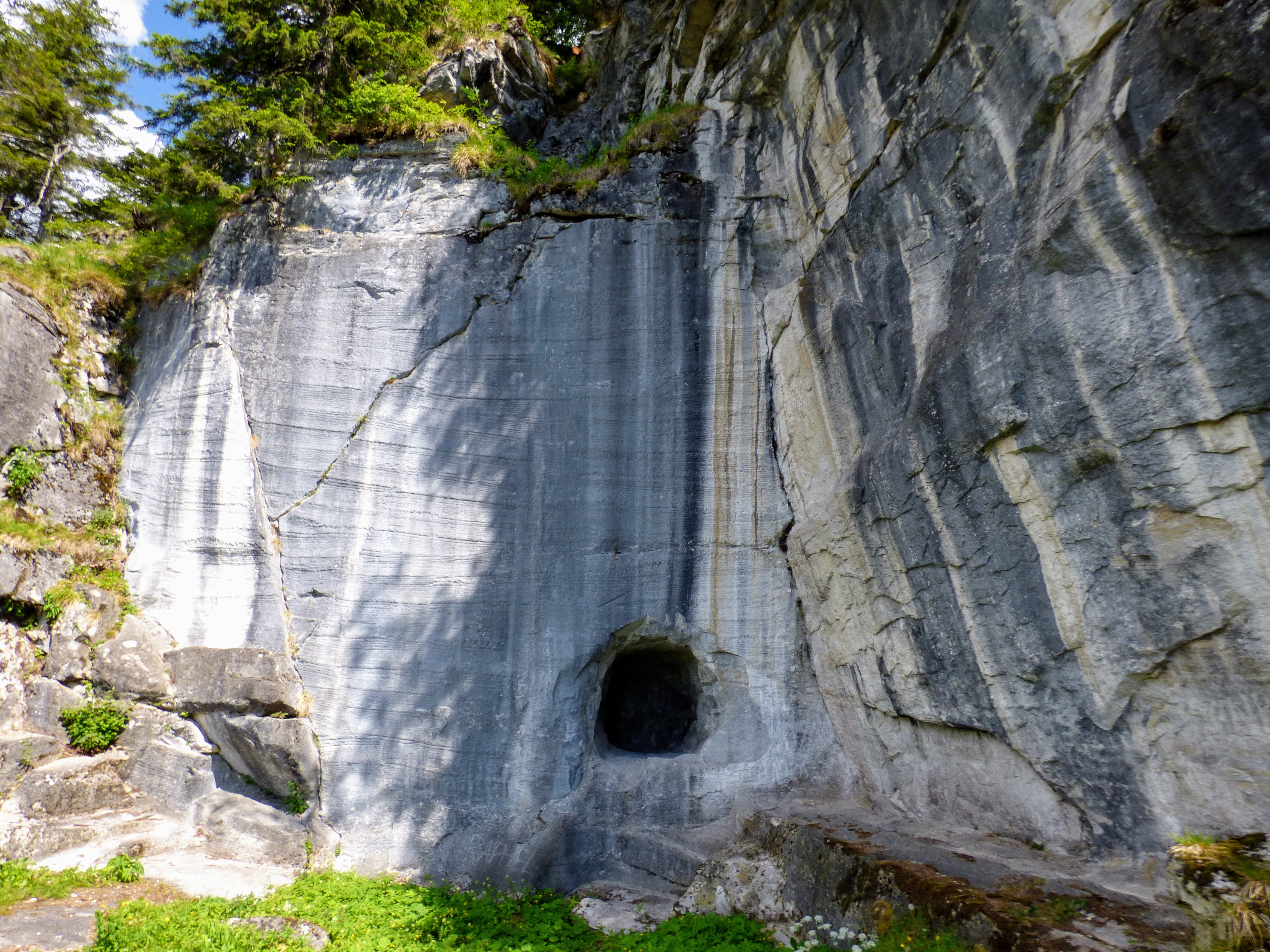 Römischer Steinbruch Spitzelofen, Gemeinde St. Georgen im Lavanttal, Kärnten Object location46° 44′ 54.62″ N, 14° 56′ 59.36″ E